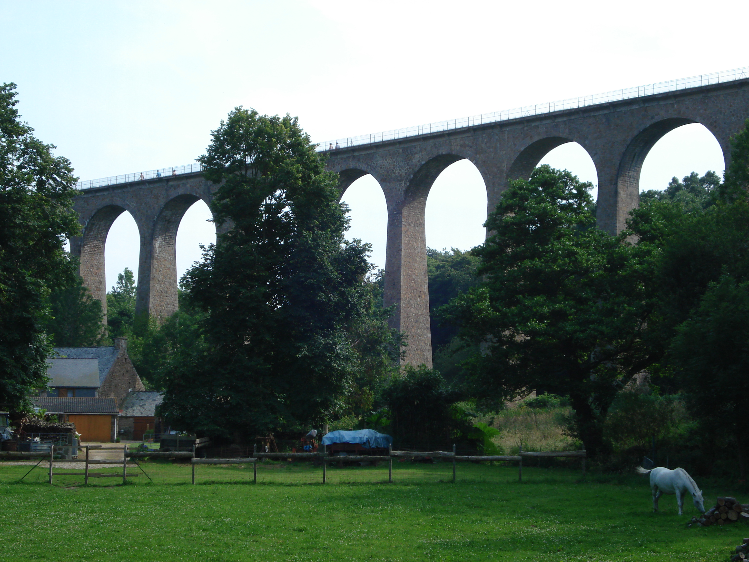 Photo du viaduc de Fermanville, Manche, France